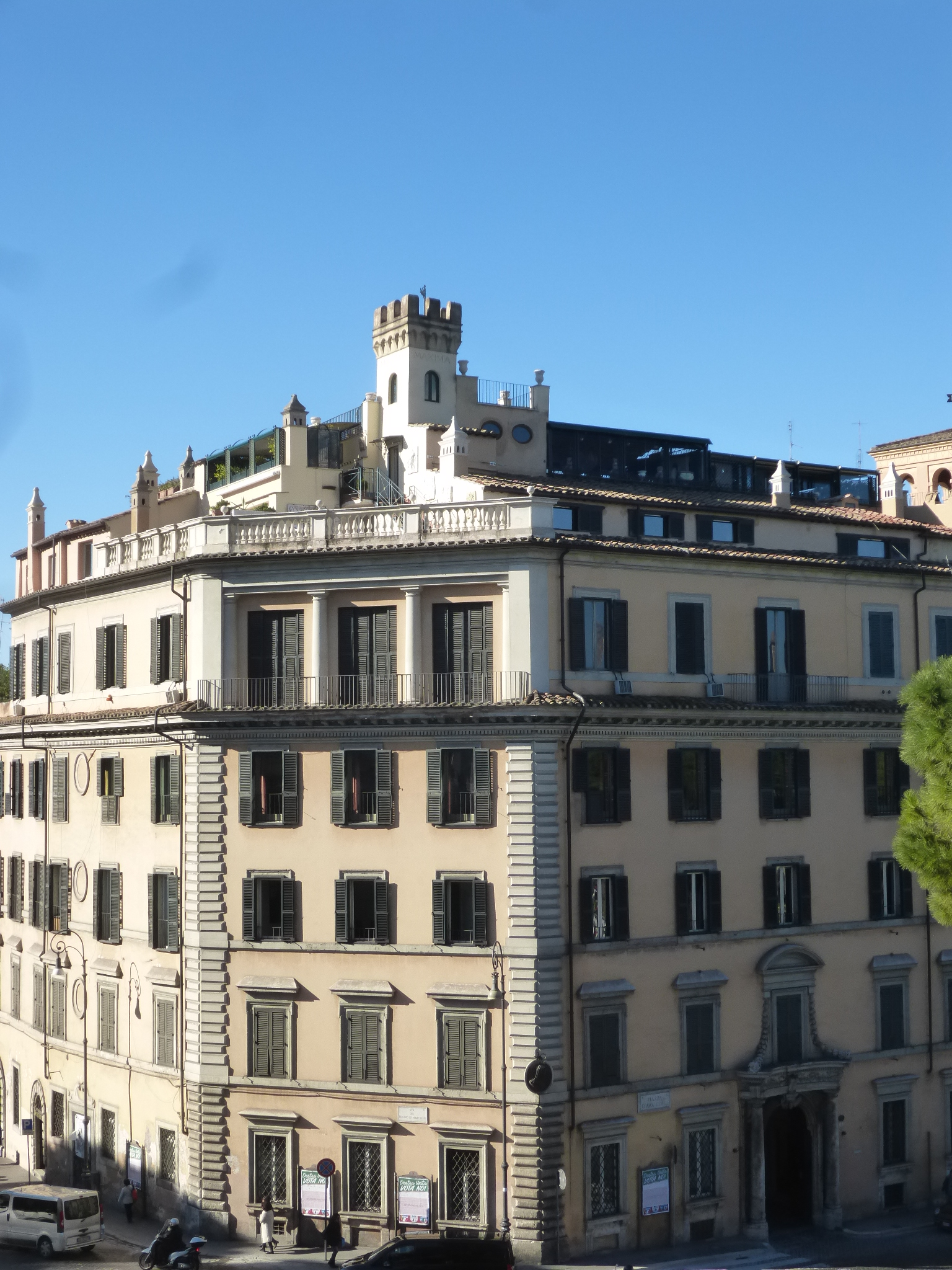 Roma, palazzo Massimo di Rignano con sopraelevazione: bed & breakfast?